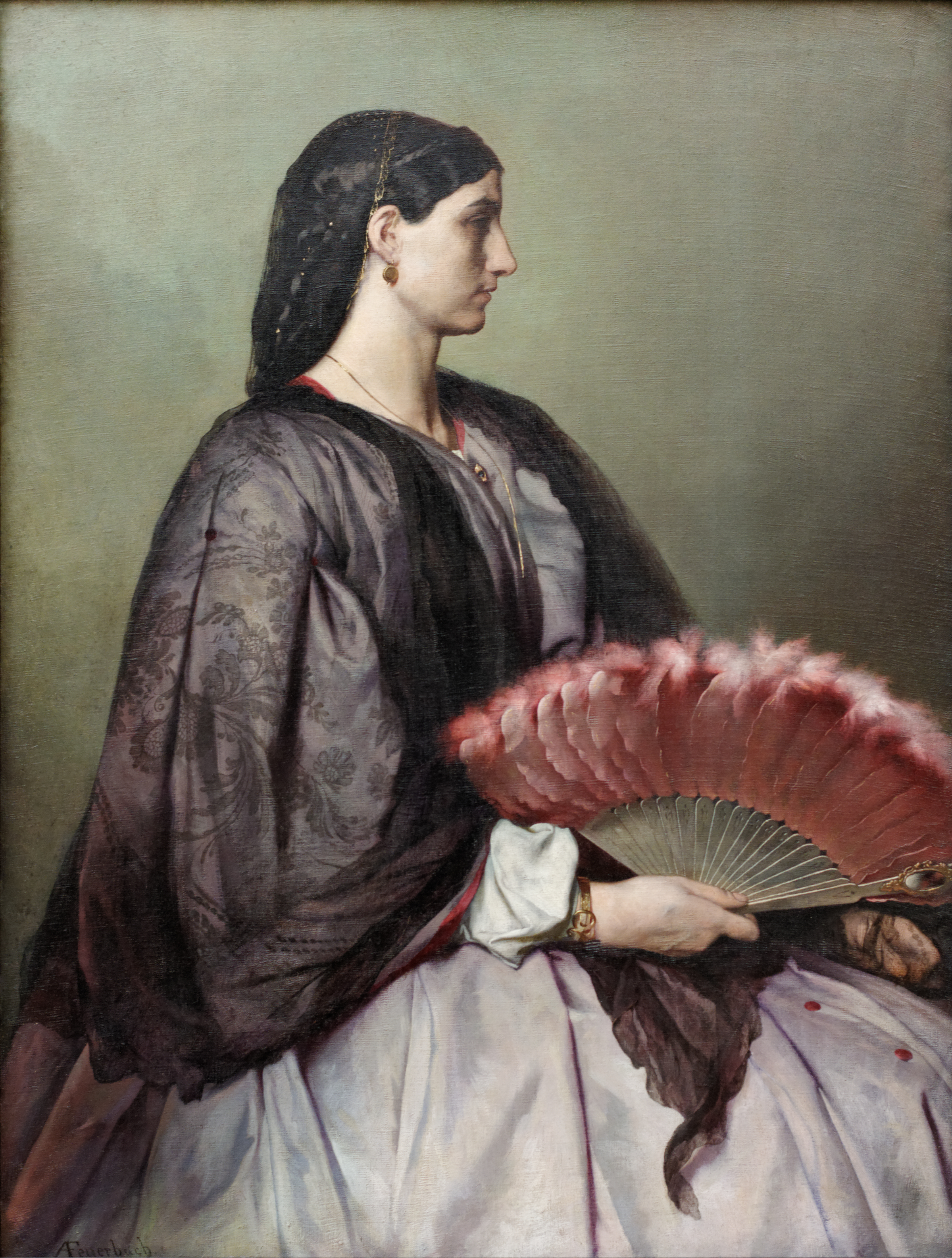 Portrait d'Anna Risi dite « Nanna » par Anselm Feuerbac.